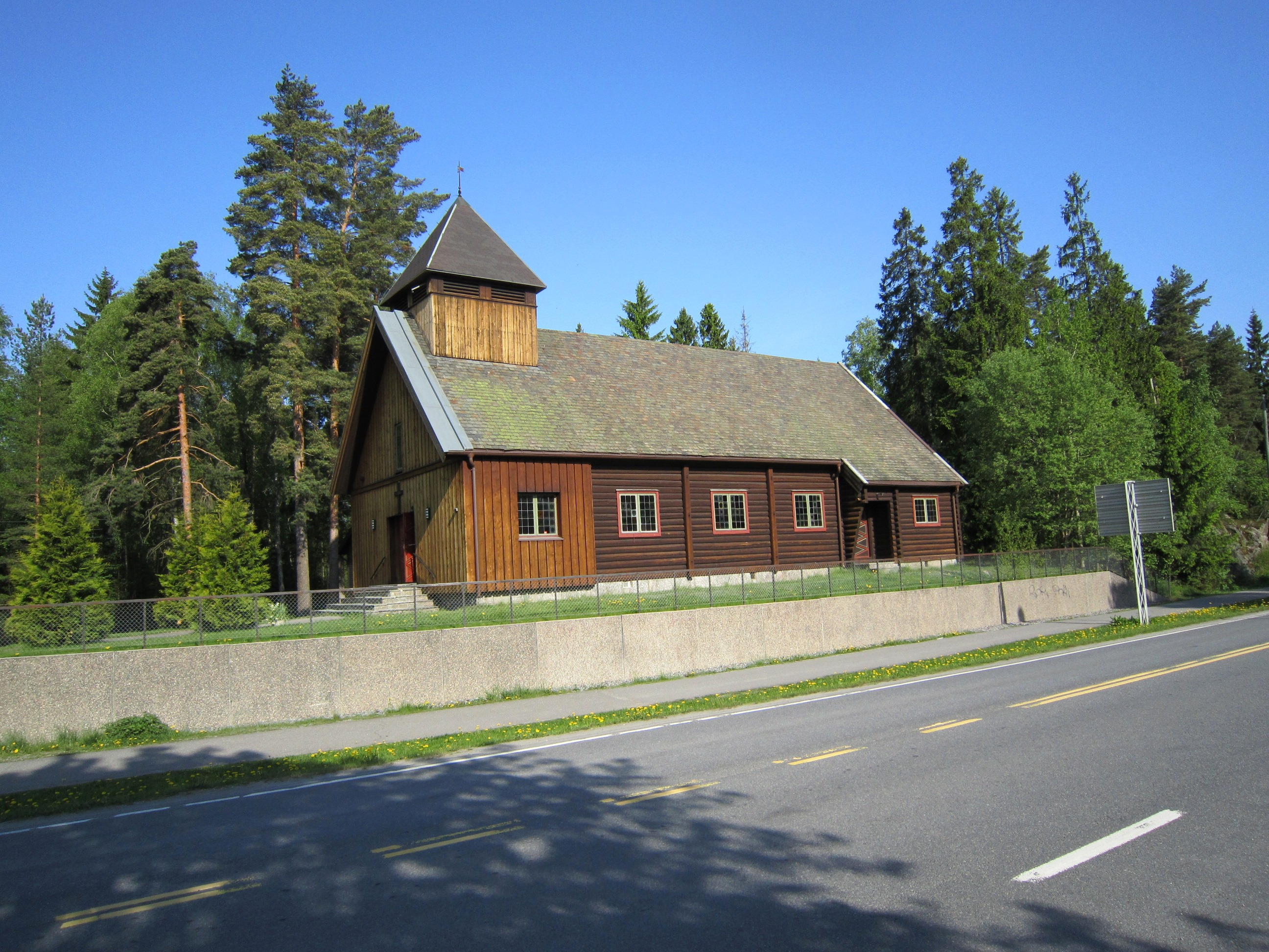 Skoklefall kirke med fylkesvei 156 foran